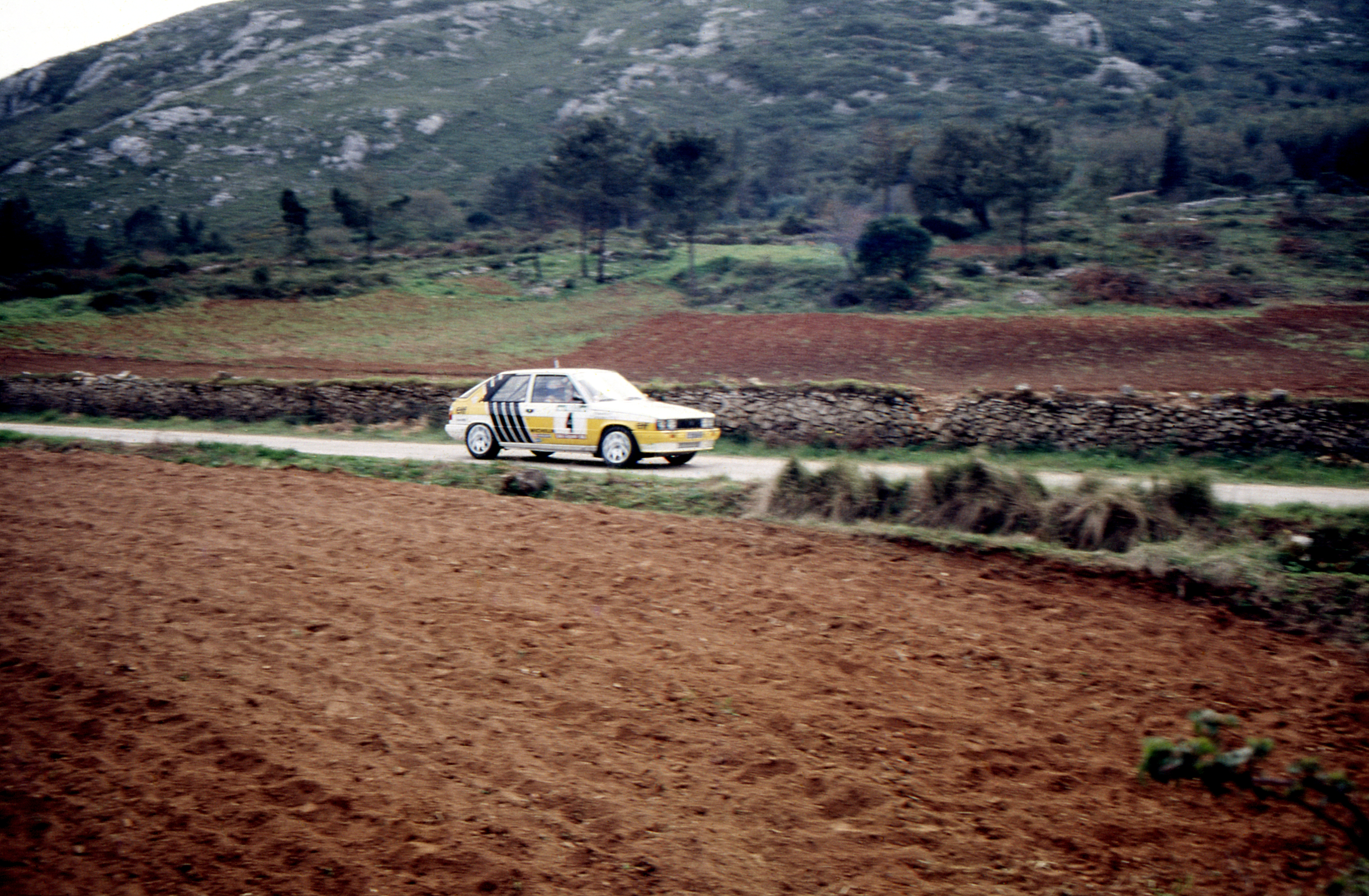 21º Rallye de Portugal - Vinho do Porto 1987 - PEC Montejunto - 11MAR1987 a 14MAR1987